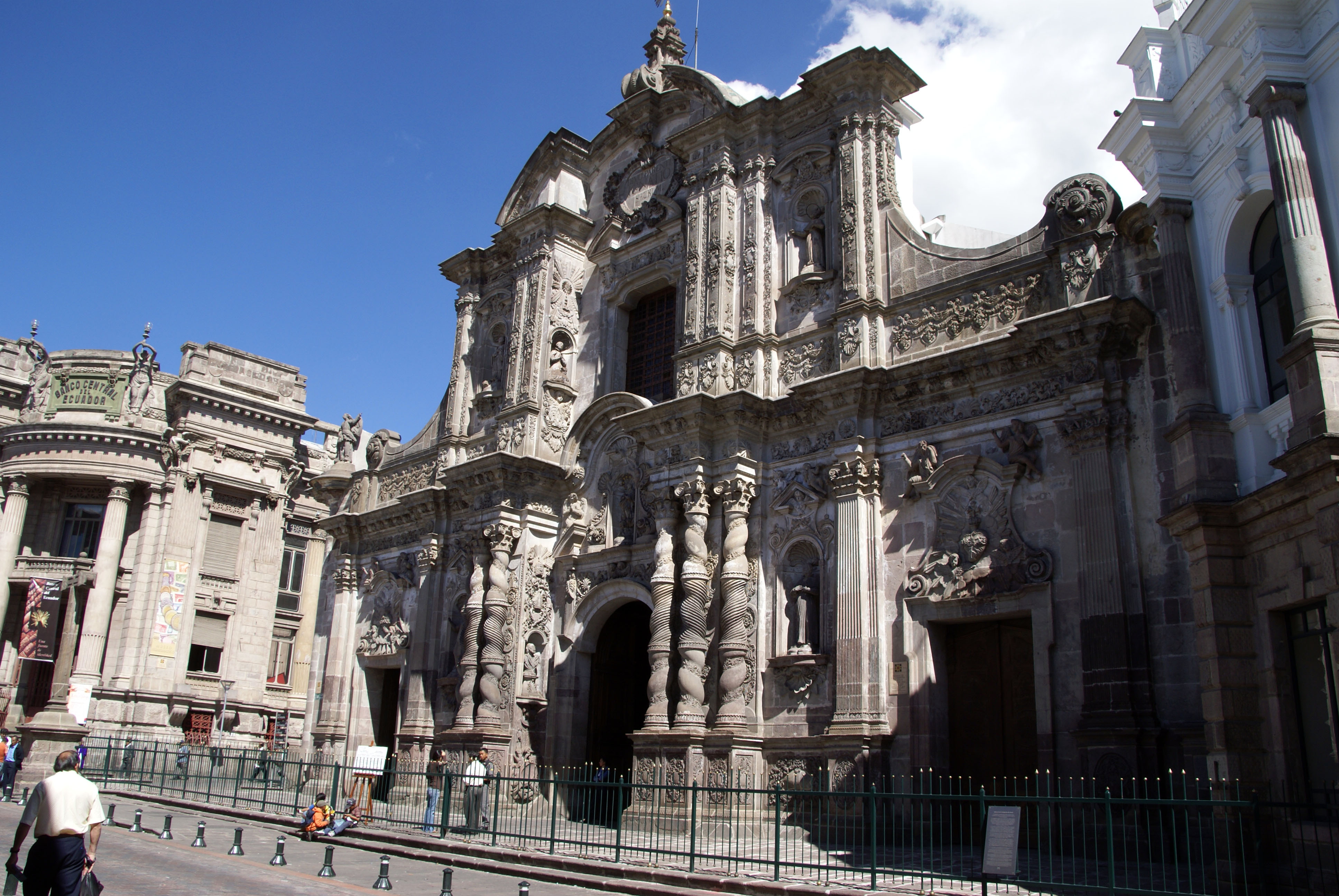 Iglesia de la Compania, Quito